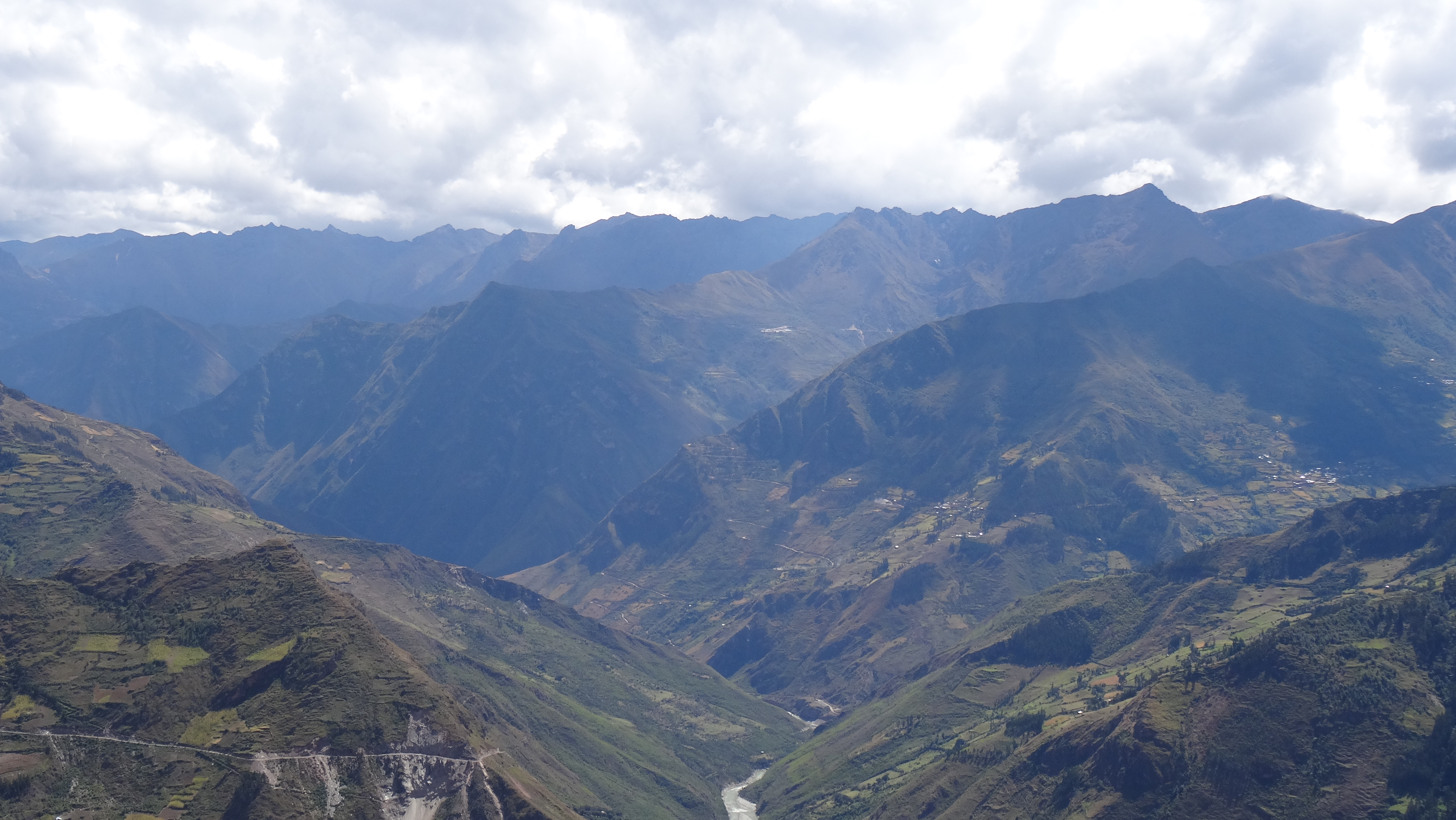 Vista de la parte occidental del distrito de Arancay desde el Complejo Arqueológico de Rapayán.